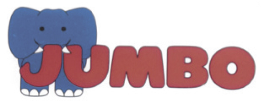 Wie der Name ist auch das erste Logo auf das Aussehen der ersten Filiale von 1972 zurückzuführen: Einen Elefanten.